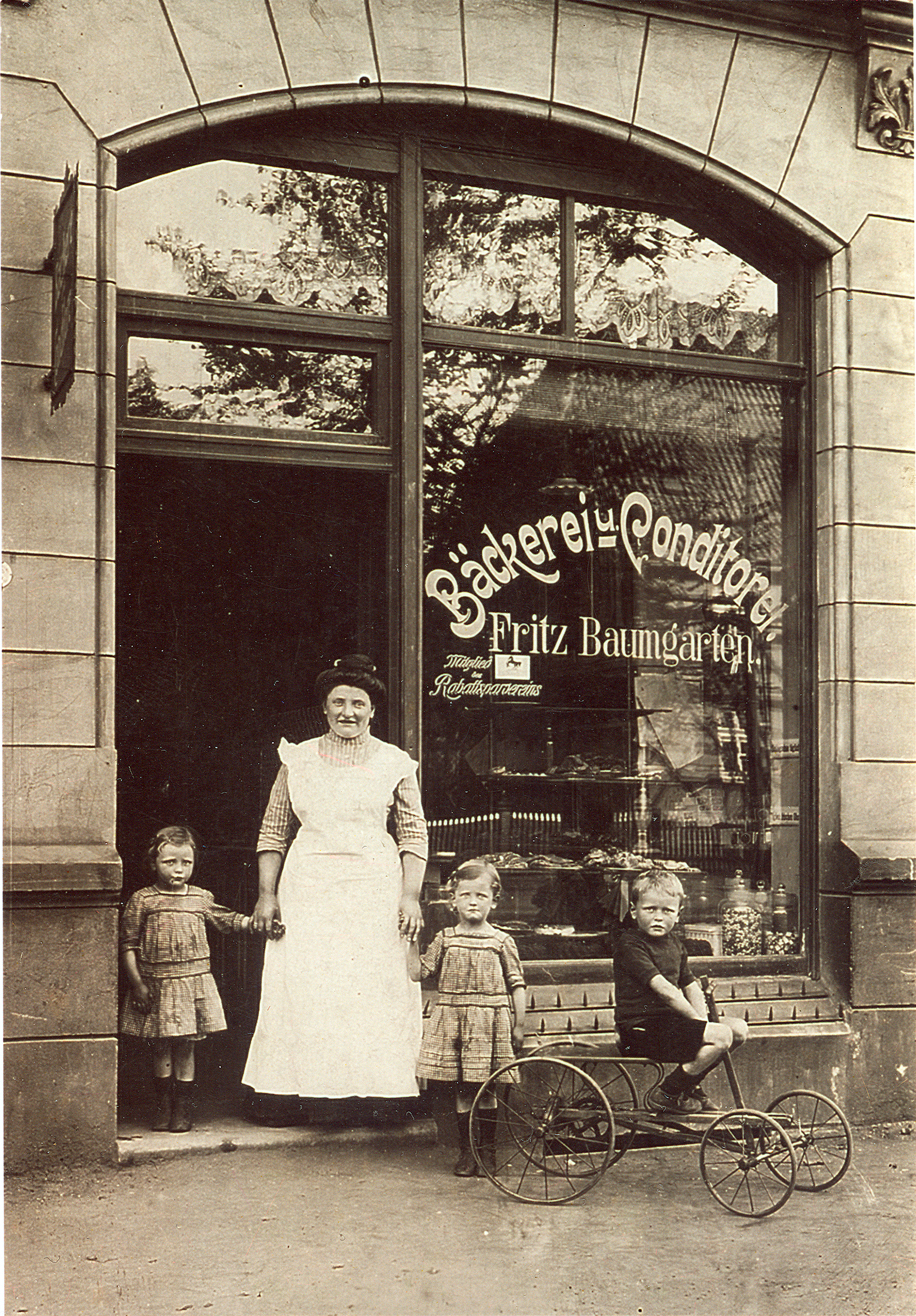 Grete Hoell (ganz links, als kleines Mädchen) und ihre (seinerzeit) beiden Geschwister vor der Bäckerei und Conditorei Fritz Baumgarten (Mitglied des Rabattsparvereins) in der damaligen Herrenhäuser Straße 48 (heute: Stöckener Straße 21); der Junge im Vordergrund sitzt auf einem sogenannten Holländer.